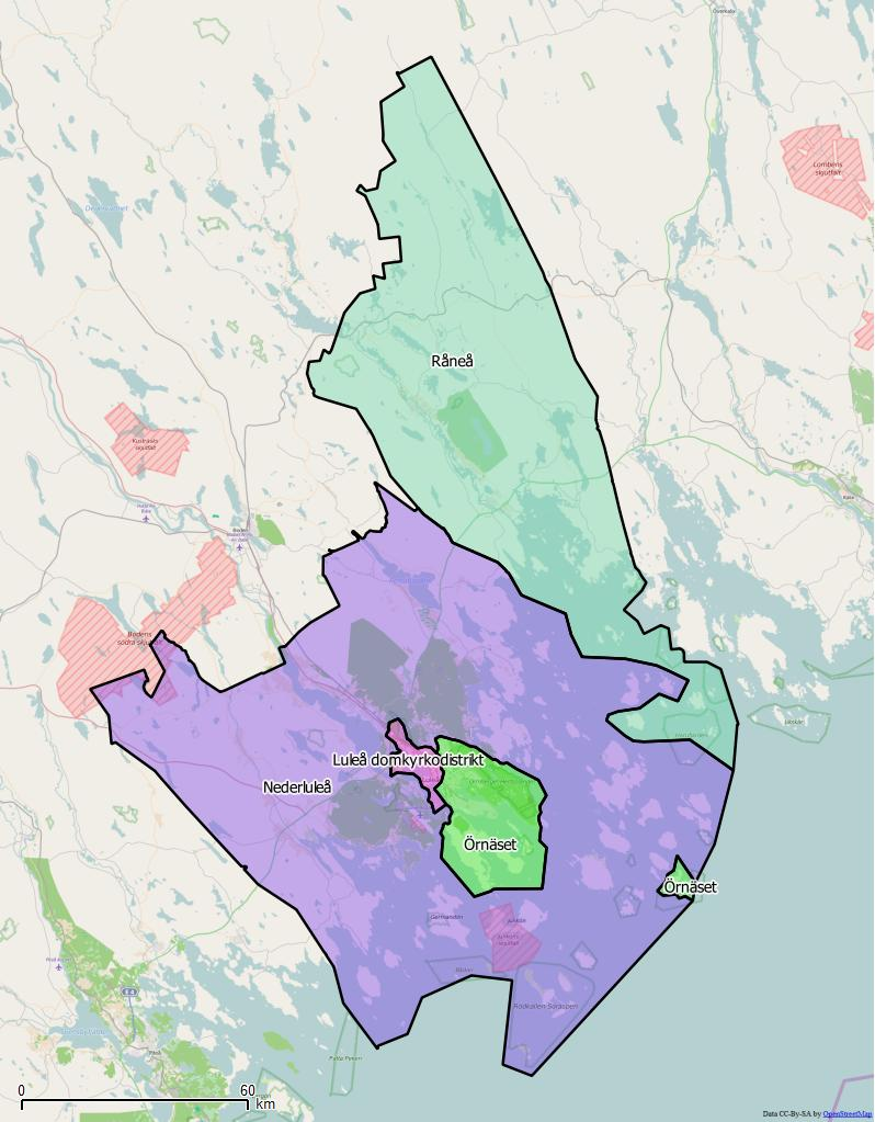 Distriktsindelningen i Luleå kommun World file: 290.10106038789785998 0 0 -290.10106038789785998 2351376.16636396385729313 9969657.50558750703930855